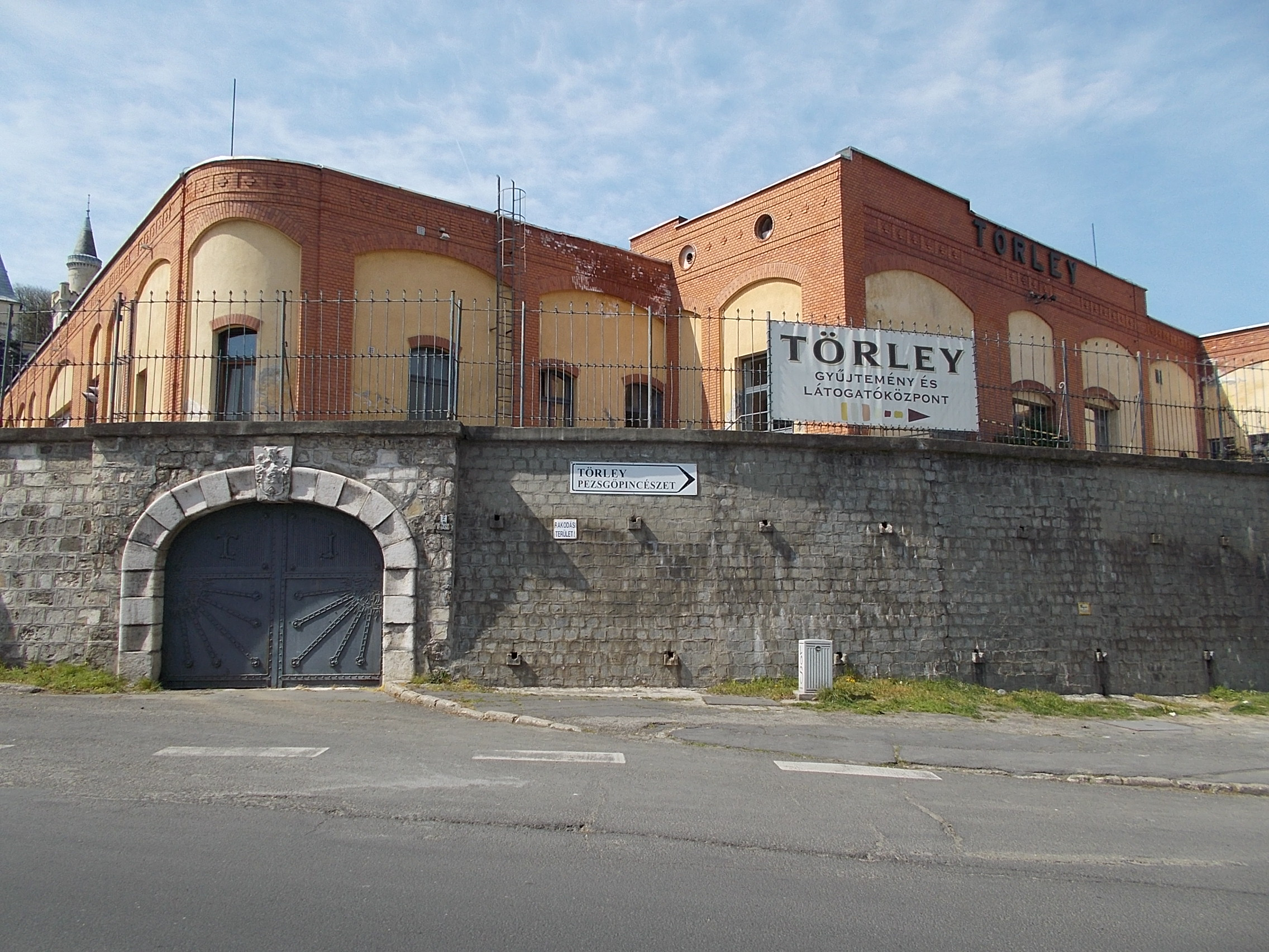 Törley-kastély. - Budapest, Budafok. 22. kerület. Anna utca